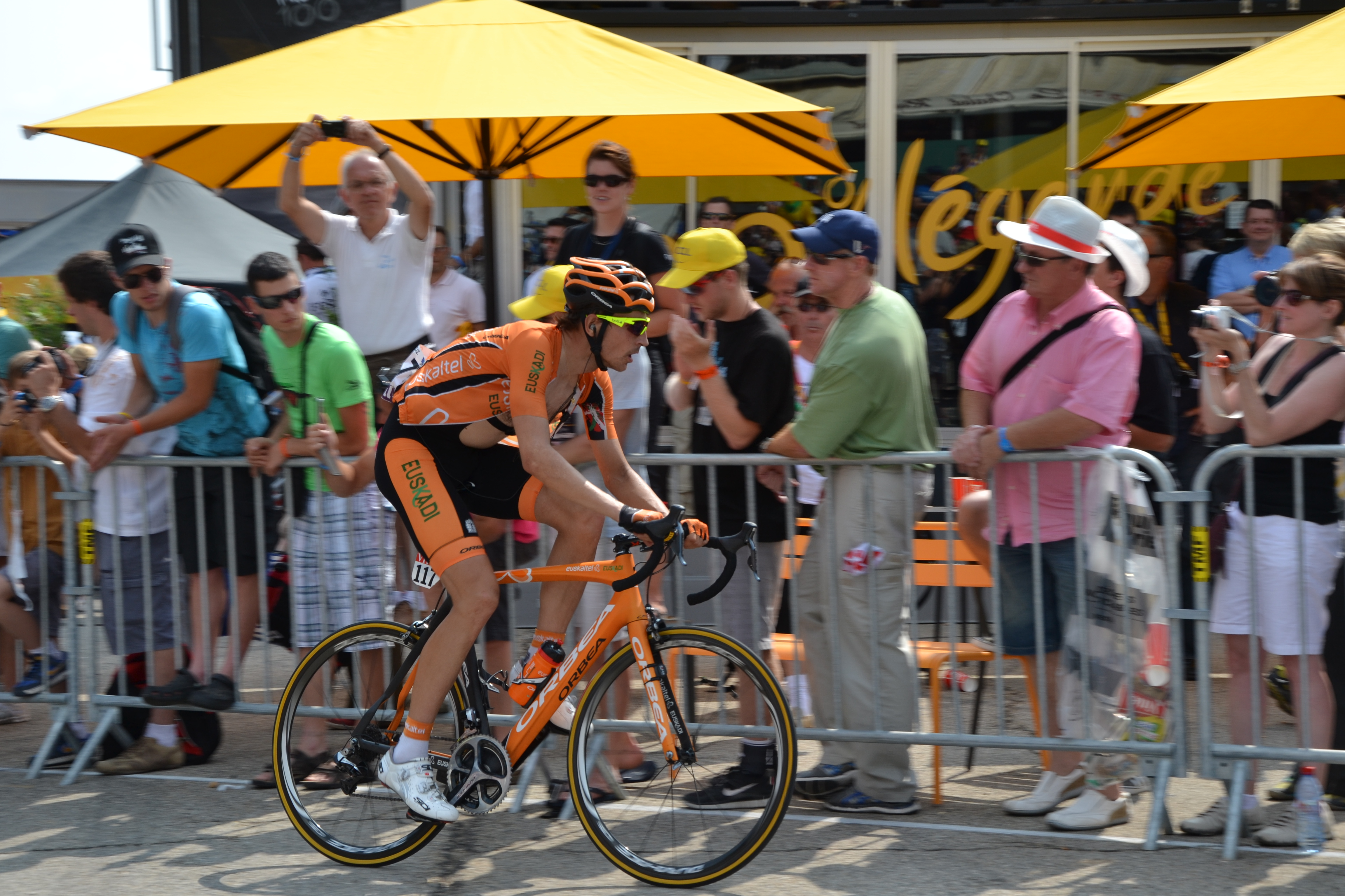 Au Chalet Reynard, lors de la 15ème étape du Tour de France 2013